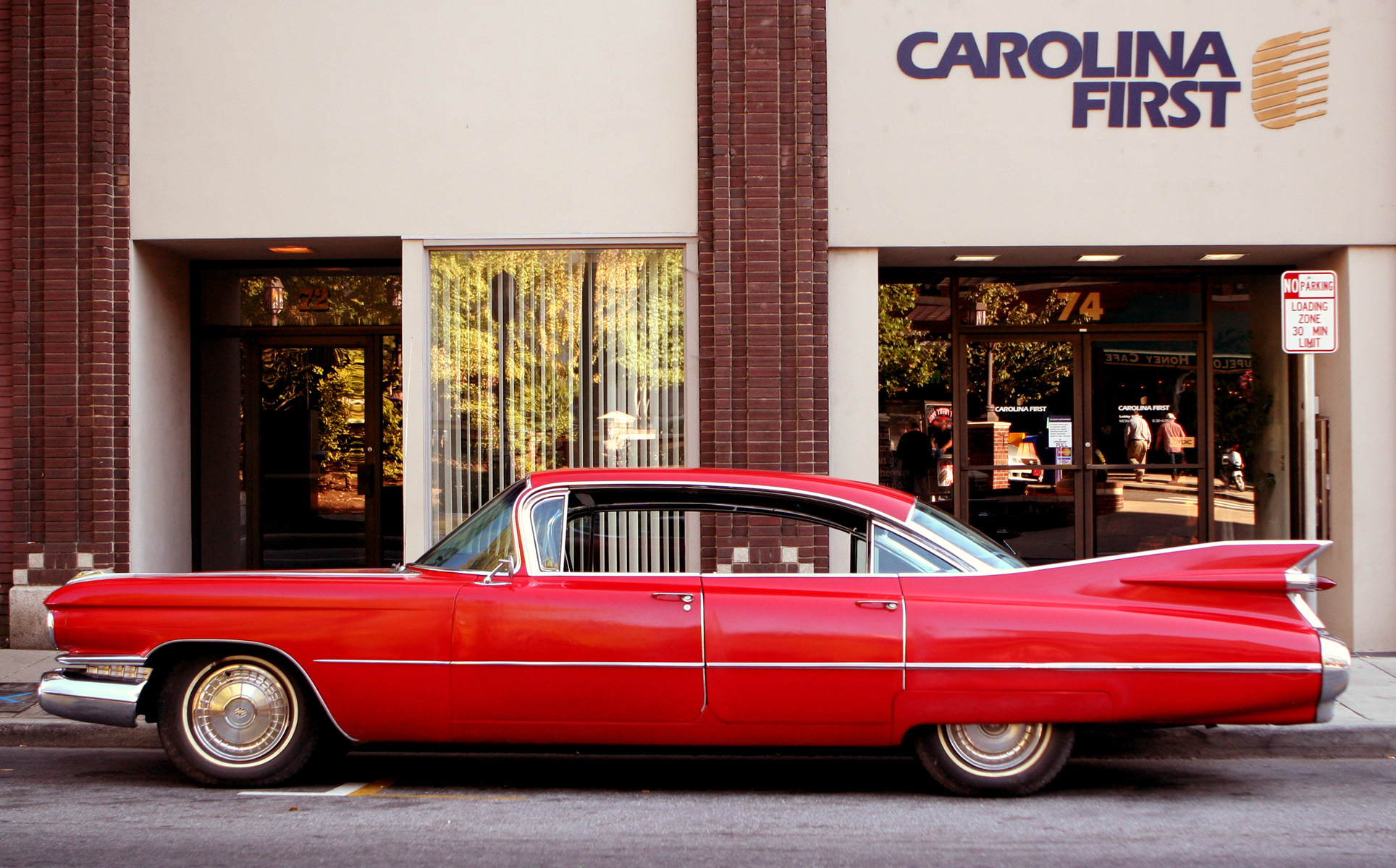 A cherry '59 Caddy.